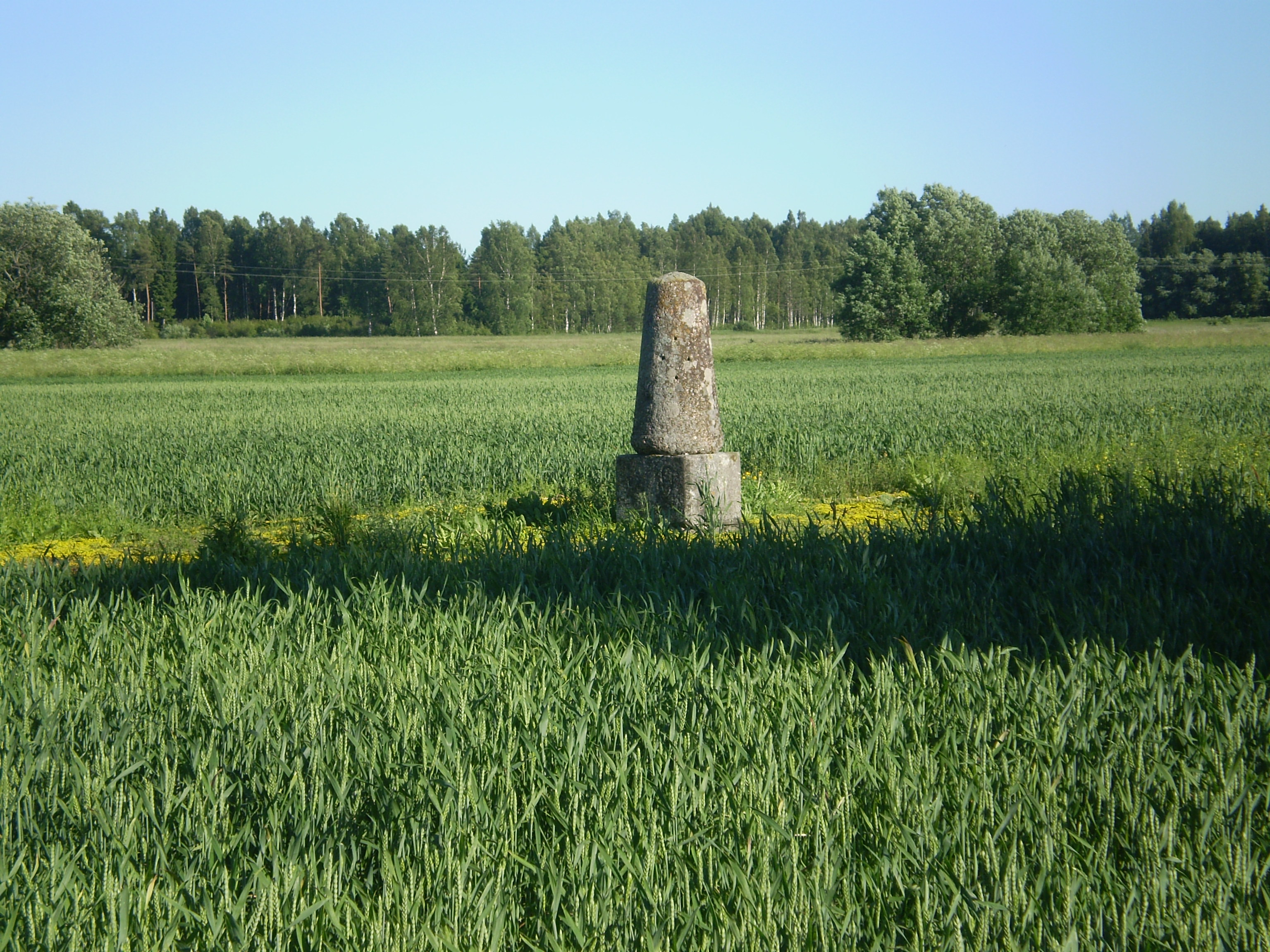 Friedrich Georg Wilhelm Struwe poolt teostatud meridiaanikaare mõõtmise Simuna-Võivere baasijoone Simuna otspunkt aastast 1827